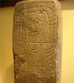 Ídolo antropomorfo tipo Hernán-Pérez